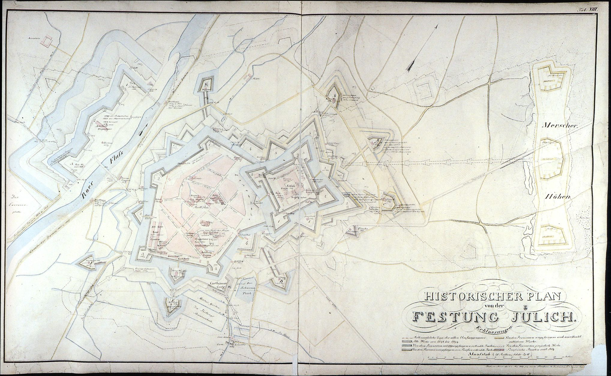 Plan Jülichs um 1837 mit allen projektierten und verwirklichten Ausbauten